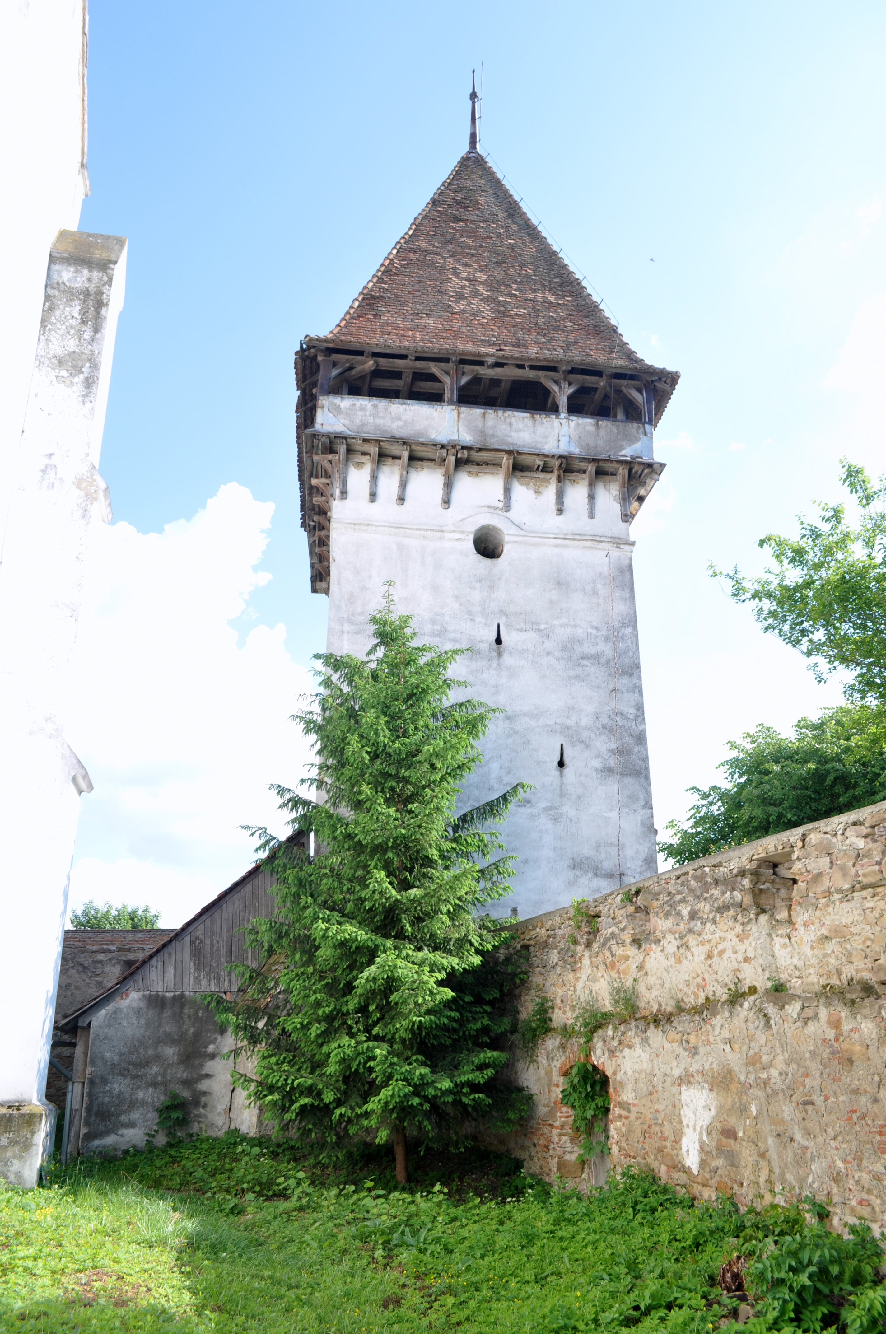 Incinta fortificată, cu turnurile, sat Senereuș; comuna Bălăușeri 02